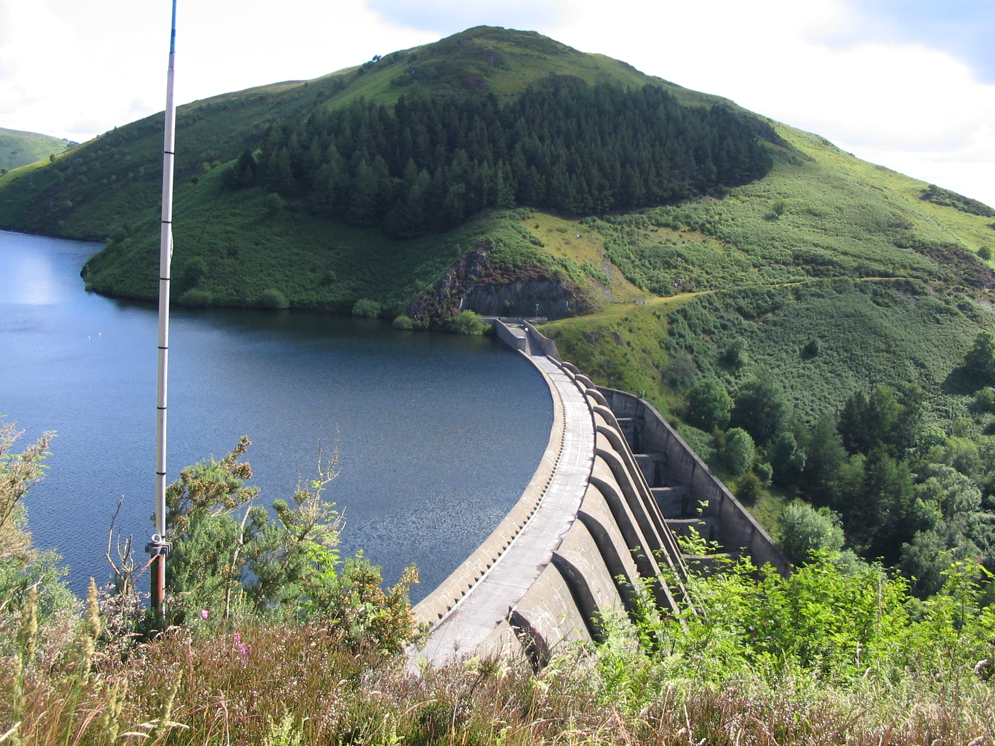 clywedog reservoir